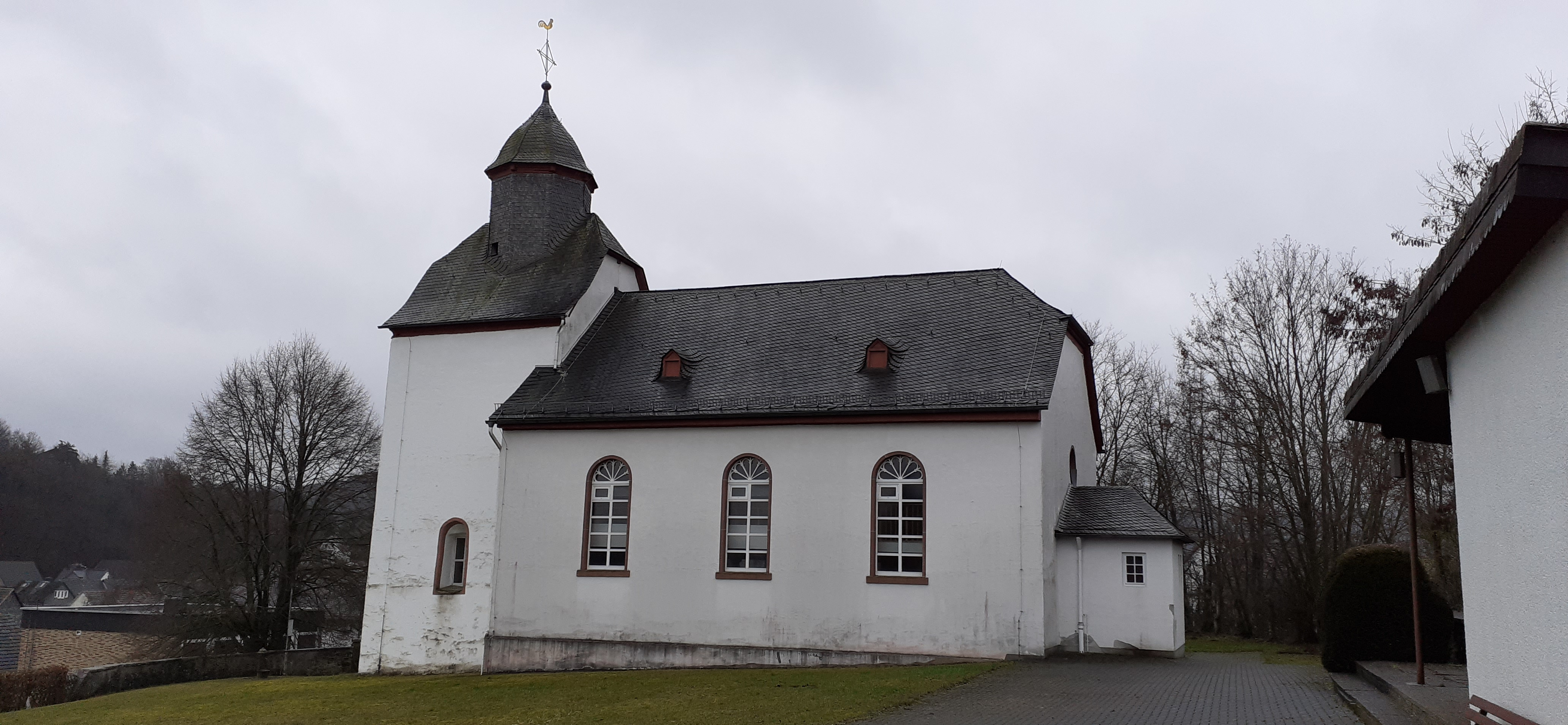 Evangelische Kirche Großaltenstädten von Norden